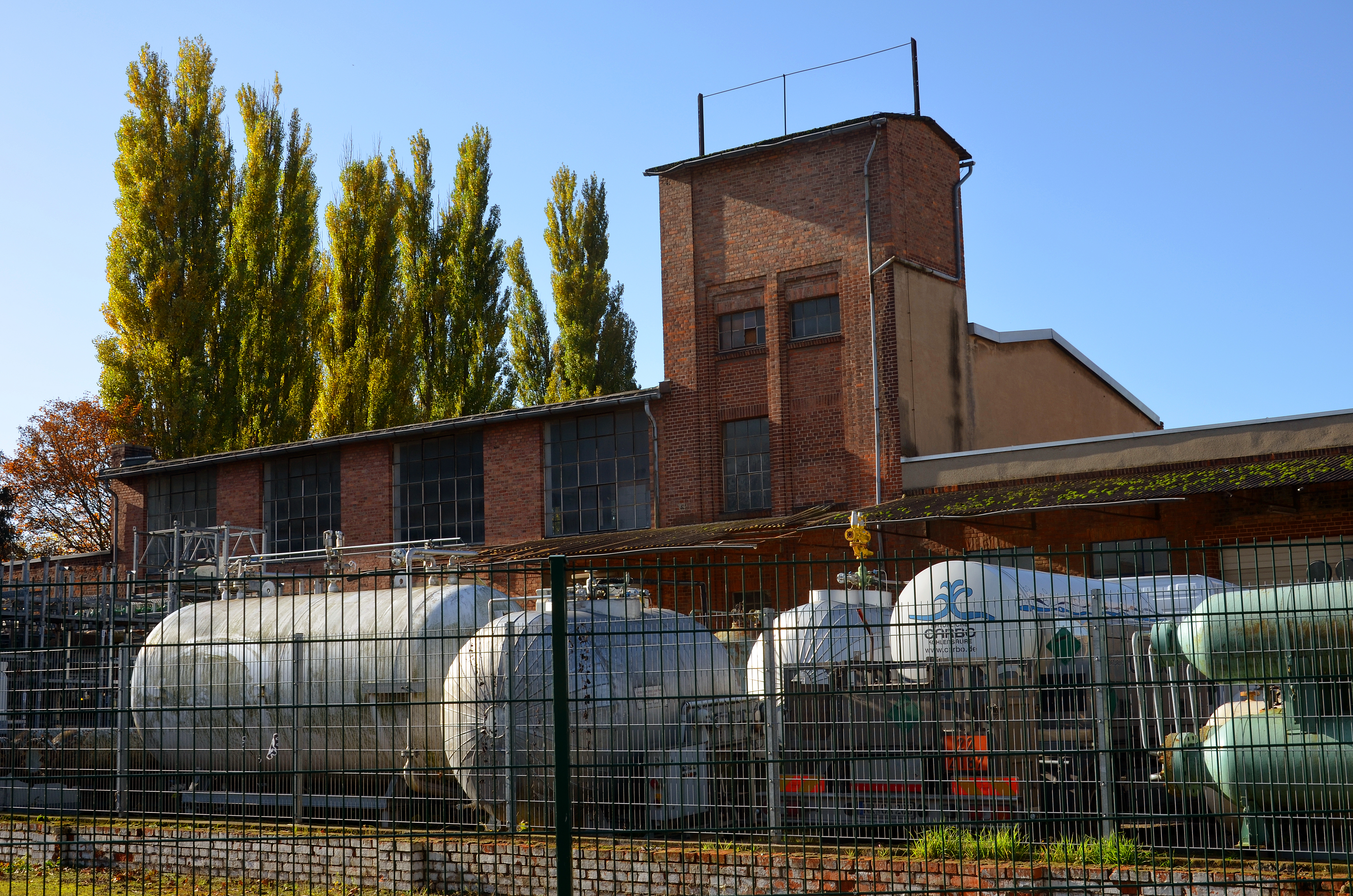 Erste Bild(ungs)-Dokumente zu dem 1902 in Rethen gegründeten heutigem Carbo Kohlensäurewerk Hannover mit Eisenbahn-Gleisanschluss und unter der Adresse Meineckestraße 12/14 in 30880 Laatzen ...